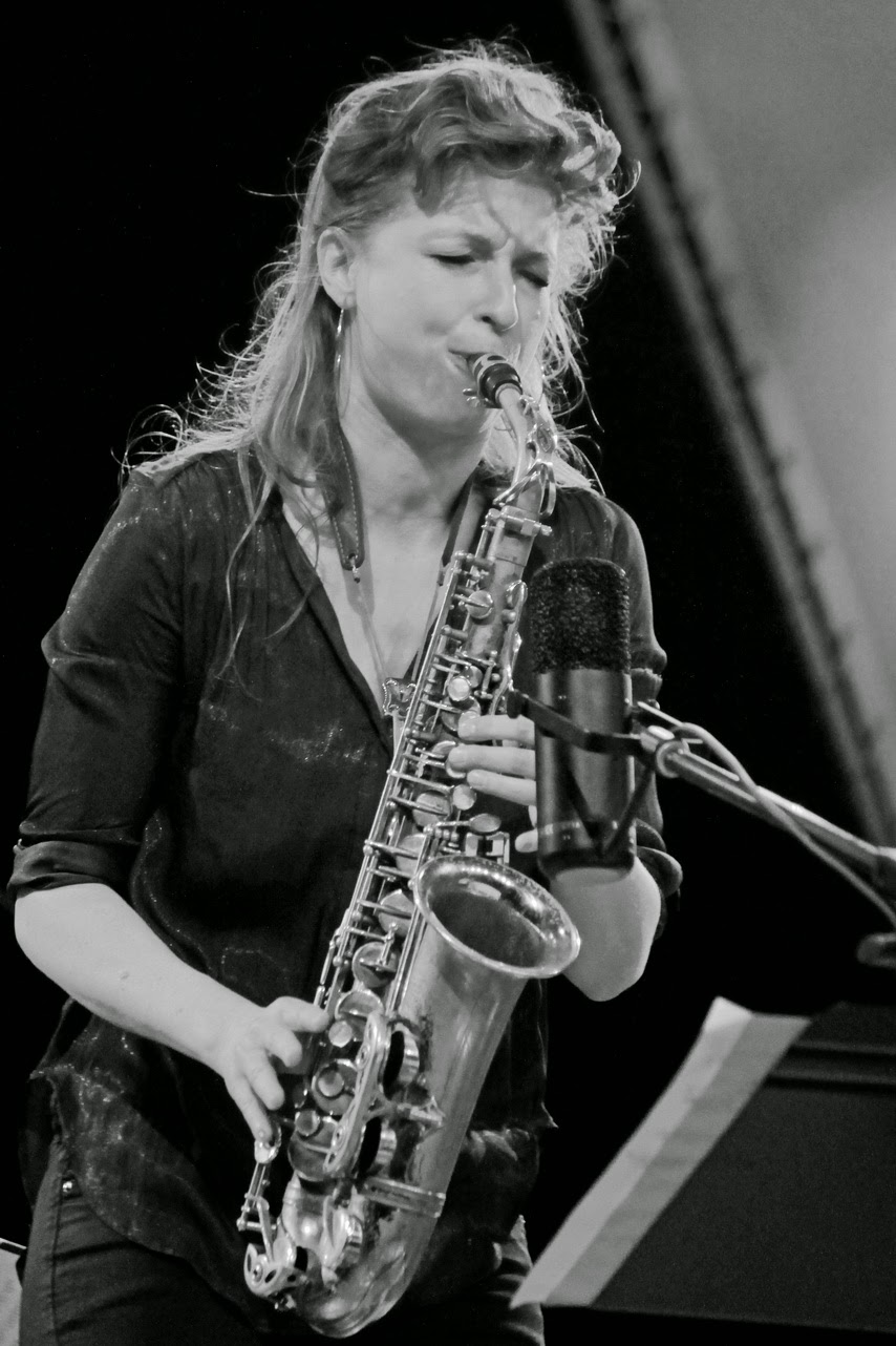 Nicole Jo auf dem Jazzfestival St. Ingbert 2015